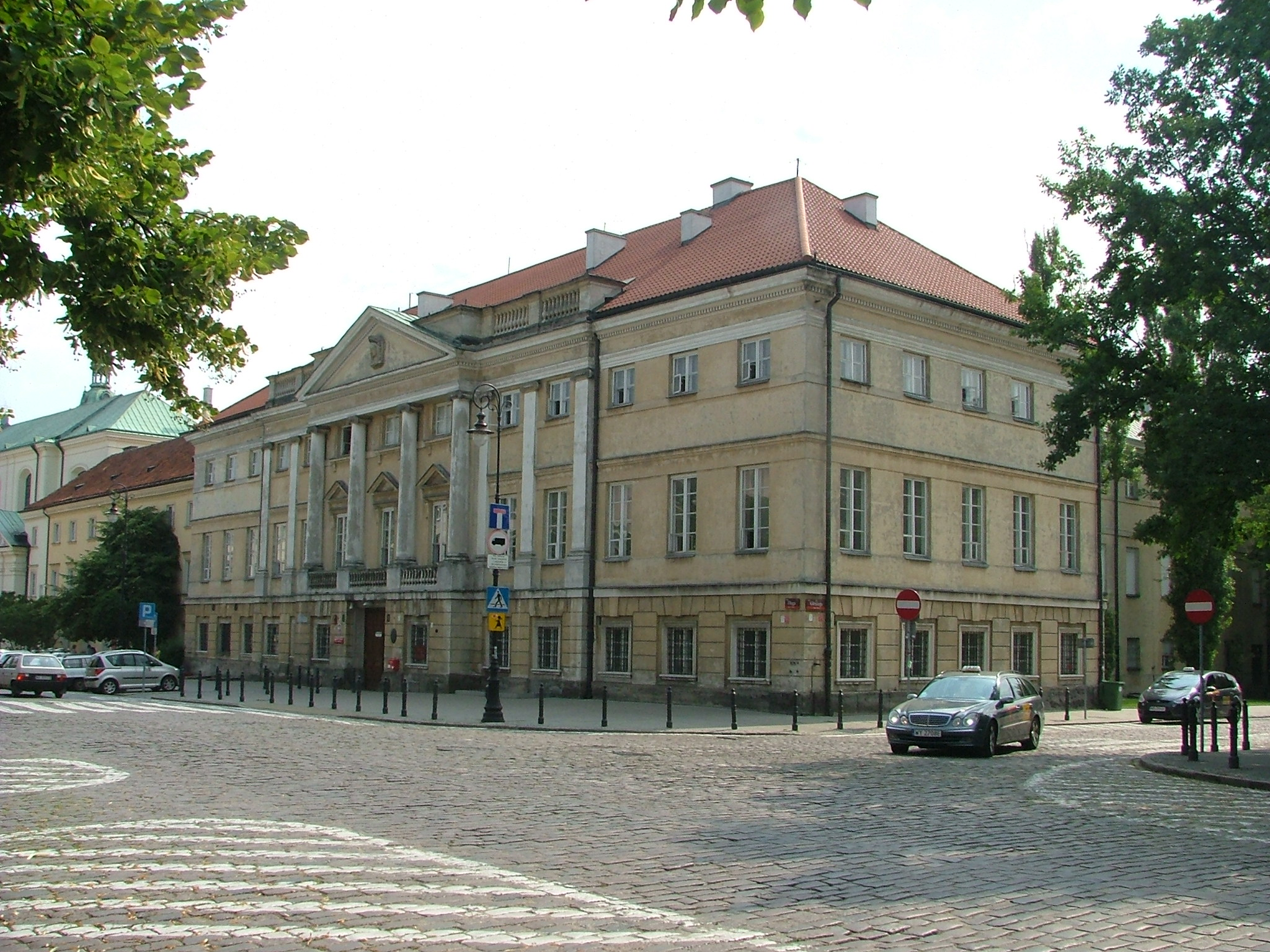 Widok budynku ze skrzyżowania ulic Długiej i Jana Kilińskiego